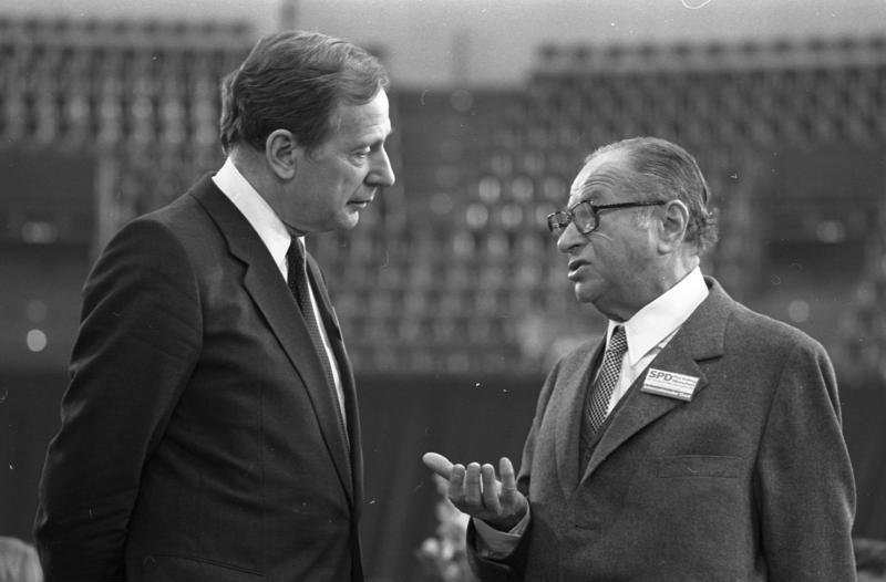 SPD-Parteitag in der Olympiahalle in München 19.-23.04.82